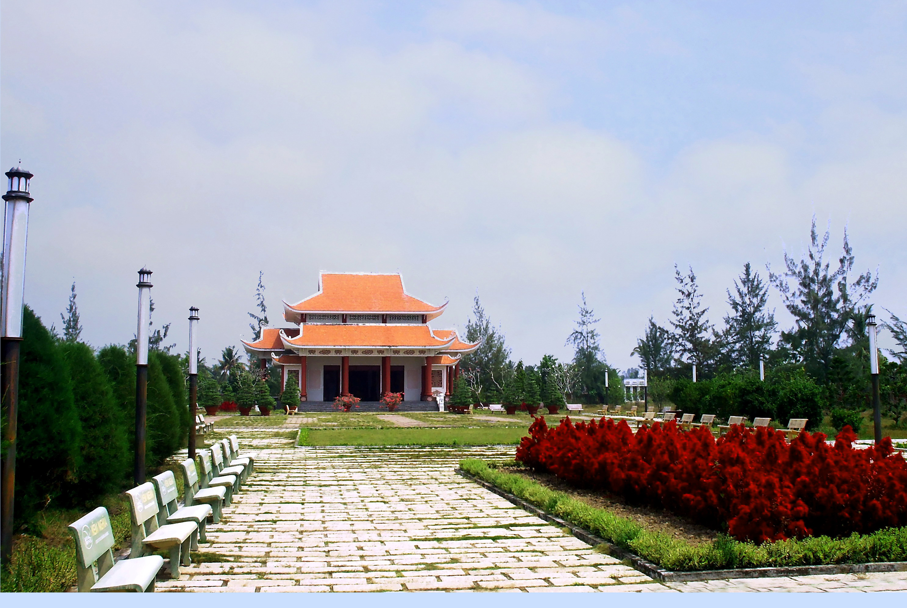 Đền thờ nữ tướng Nguyễn Thị Định (1920-1992) ở ấp Phong Điền, xã Lương Hòa, huyện Giồng Trôm, tỉnh Bến Tre, Việt Nam.